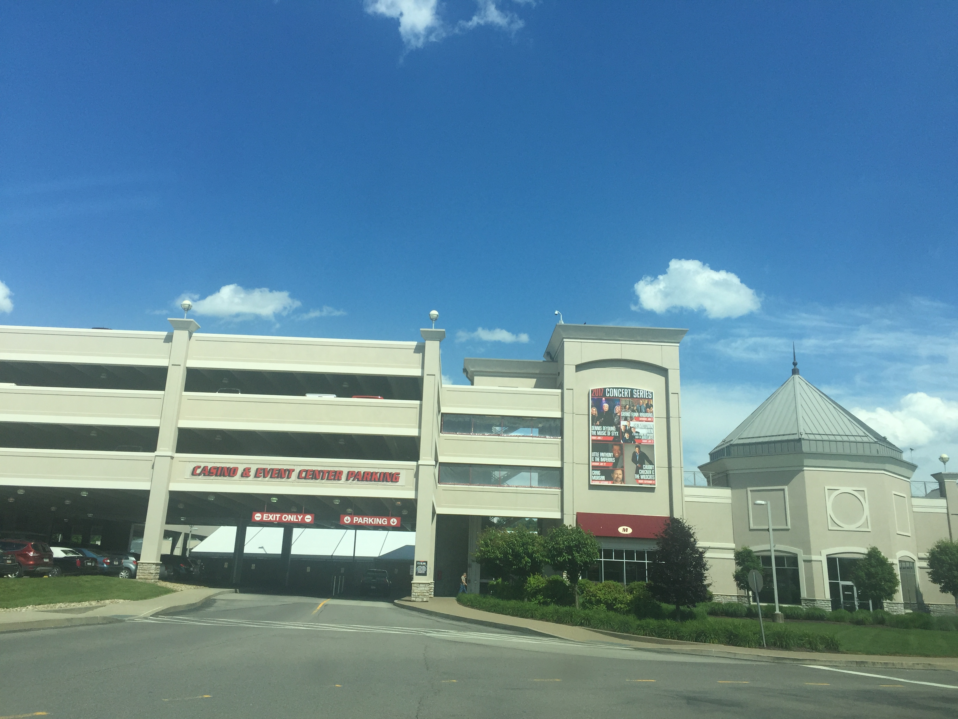 Meadows garage